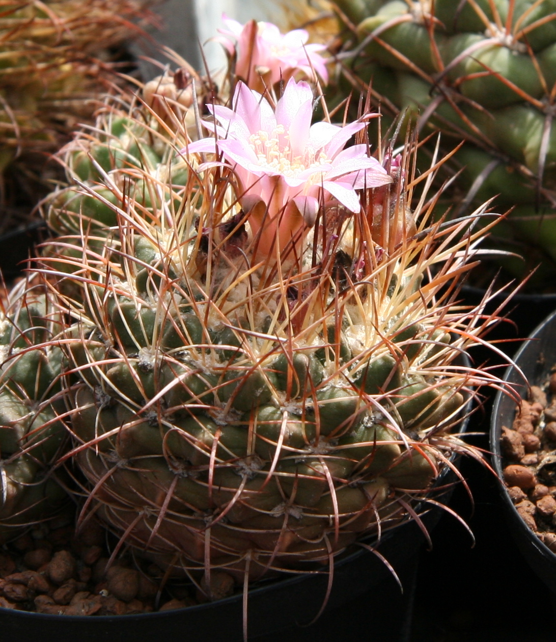 Neowerdermannia vorwerkii VZ176, in der Sammlung deVries